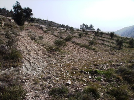 Image:Solana_12_febrer_2006_043.jpg